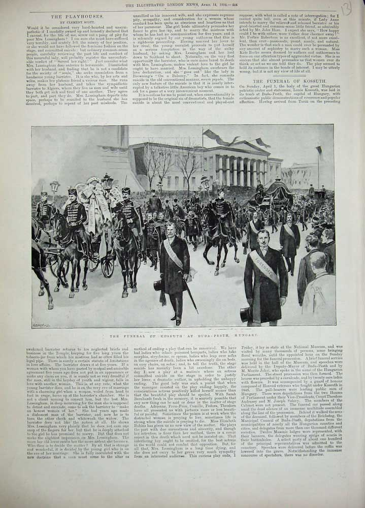 Kossuth Lajos temetési menete a Nemzeti Múzeum előtt 1894 április 1-én